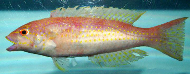 Decodon puellaris, Gulf of Mexico